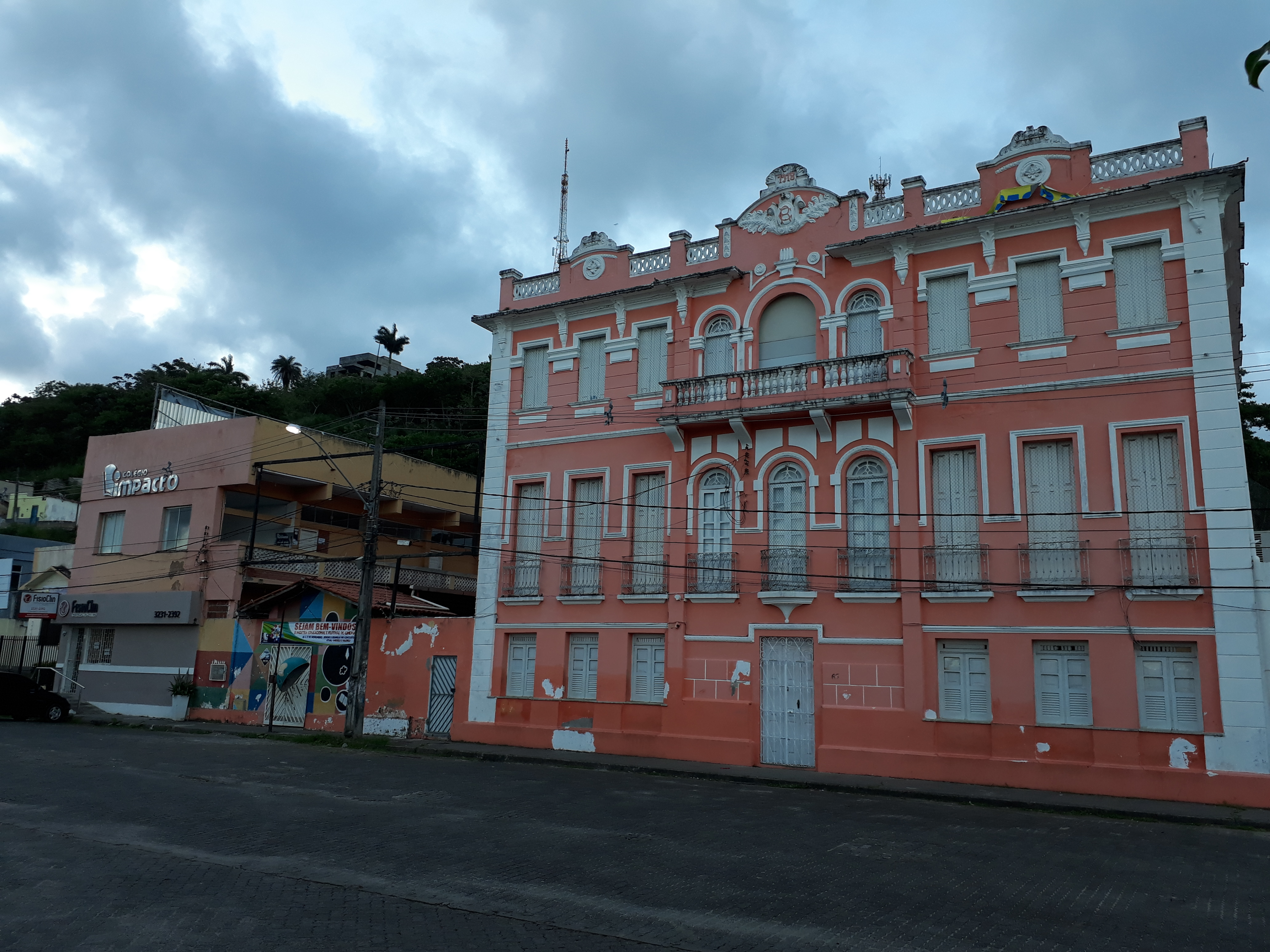 Localizado na Rua Ramiro de Castro, no bairro do Centro. Rede de ensino privada, e com o seguimento de Educação Infantil ao Ensino Médio.